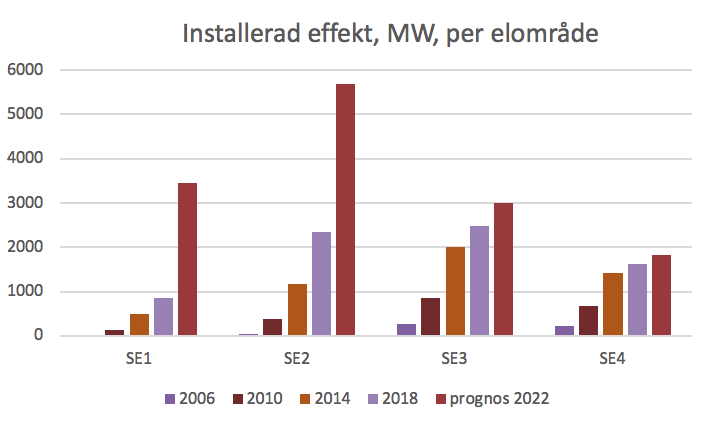 Stapeldiagram över installerad vindkrafteffekt per elområde 2006, 2010, 2014, 2018 och prognos 2022. Historiska data är från Energiimyndighetens vindkraftstatistik. Prognossiffrorna är från branschorganisationen Svensk Vindenergis prognos kv1 2019.